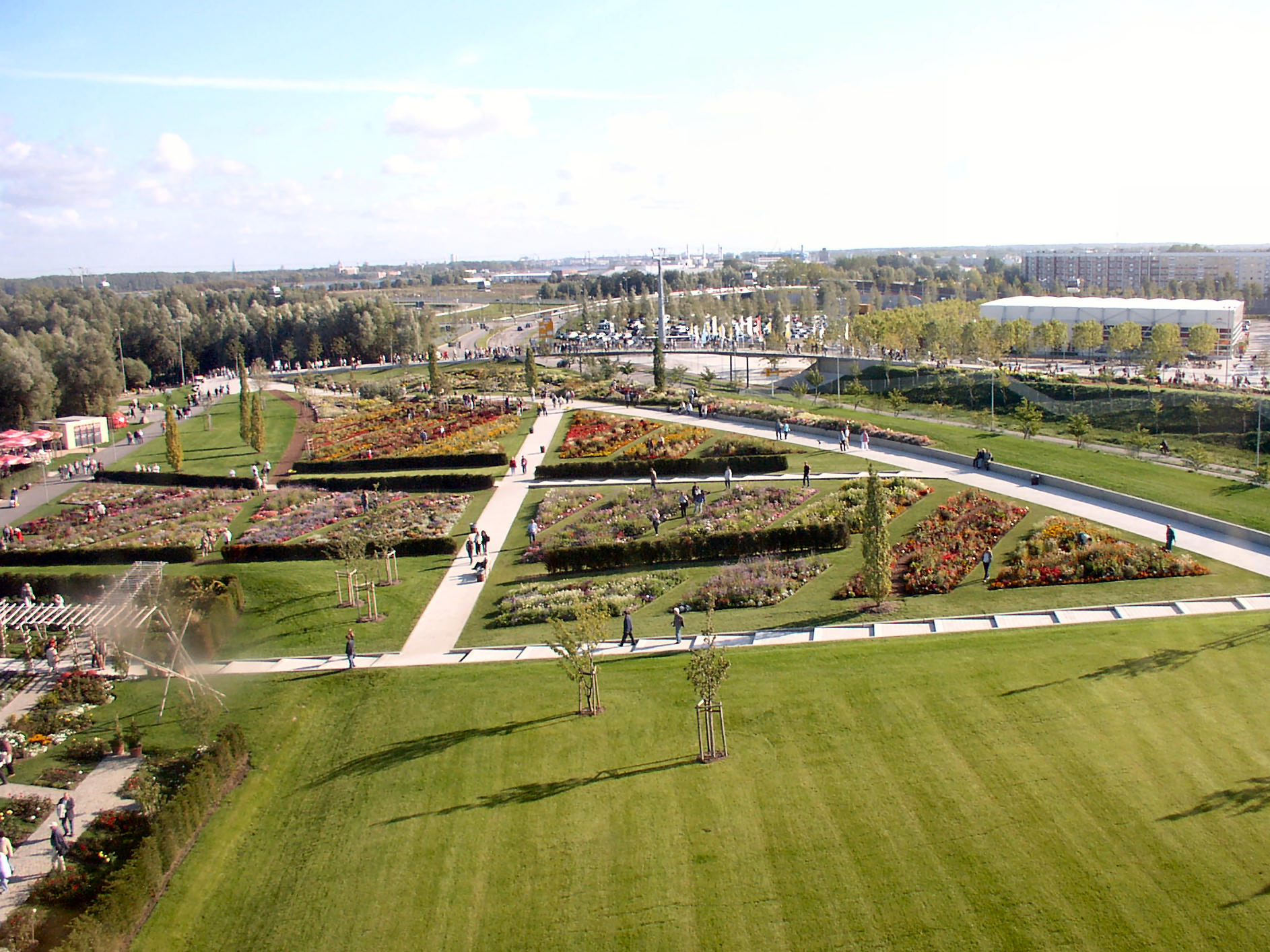 IGA 2003 in Rostock Schmarl, Außenanlagen